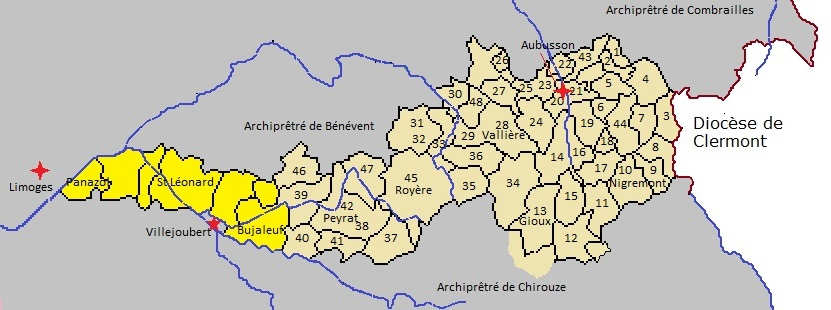 Archiprêtré d'Aubusson 1315 (Archiv. Dept 23)